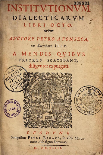 Institutionum dialecticarum libri octo, 1614, Pedro da Fonseca (1528-1599)